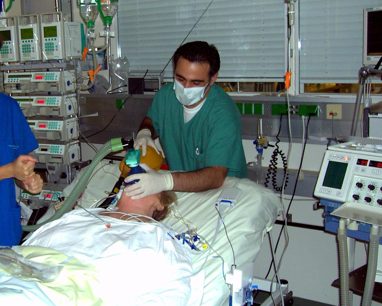 Təcili intubasiya zamanı mask vasitəsilə süni tənəffüsün aparılması